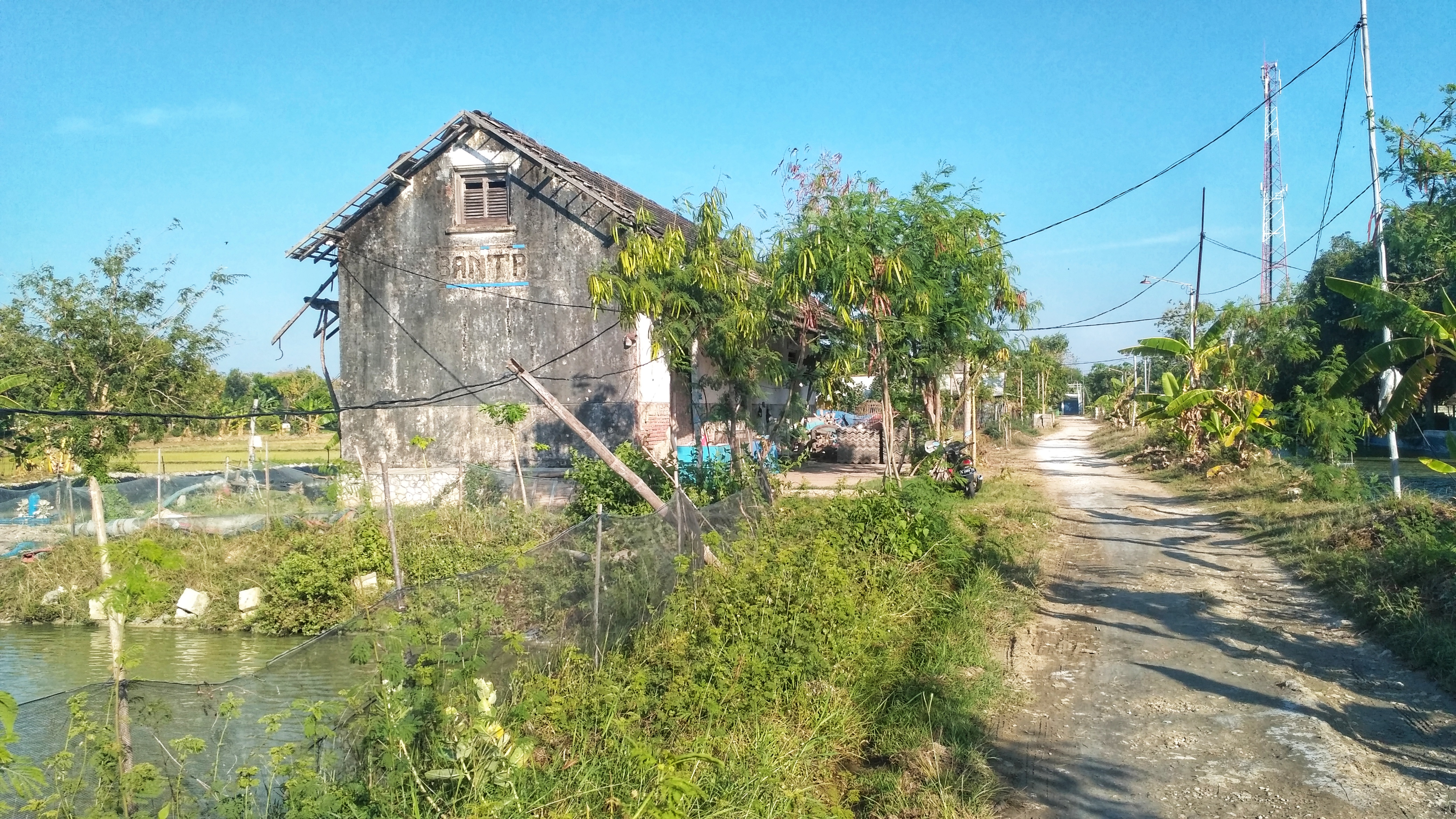 Wujud perspektif Stasiun Palang dari arah barat.